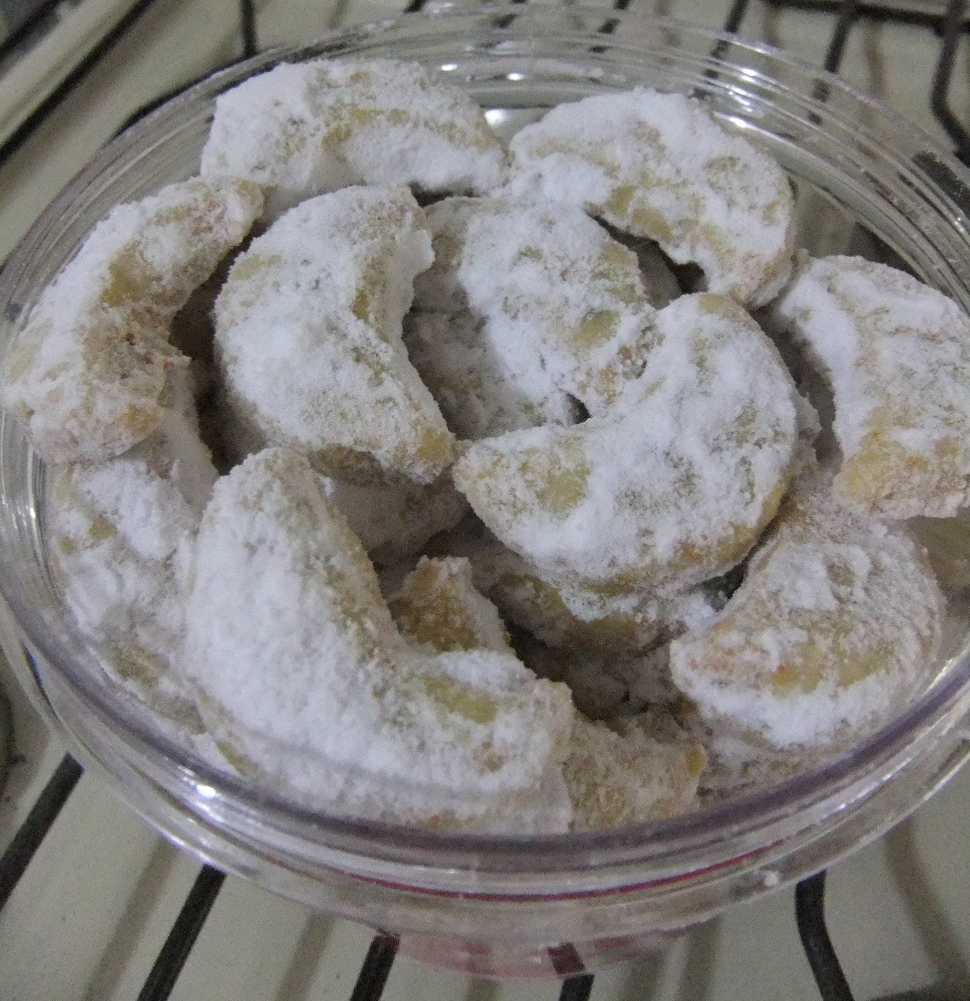 Kue putri salju, Indonesia